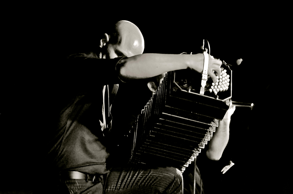 Fabio Furia in concerto.